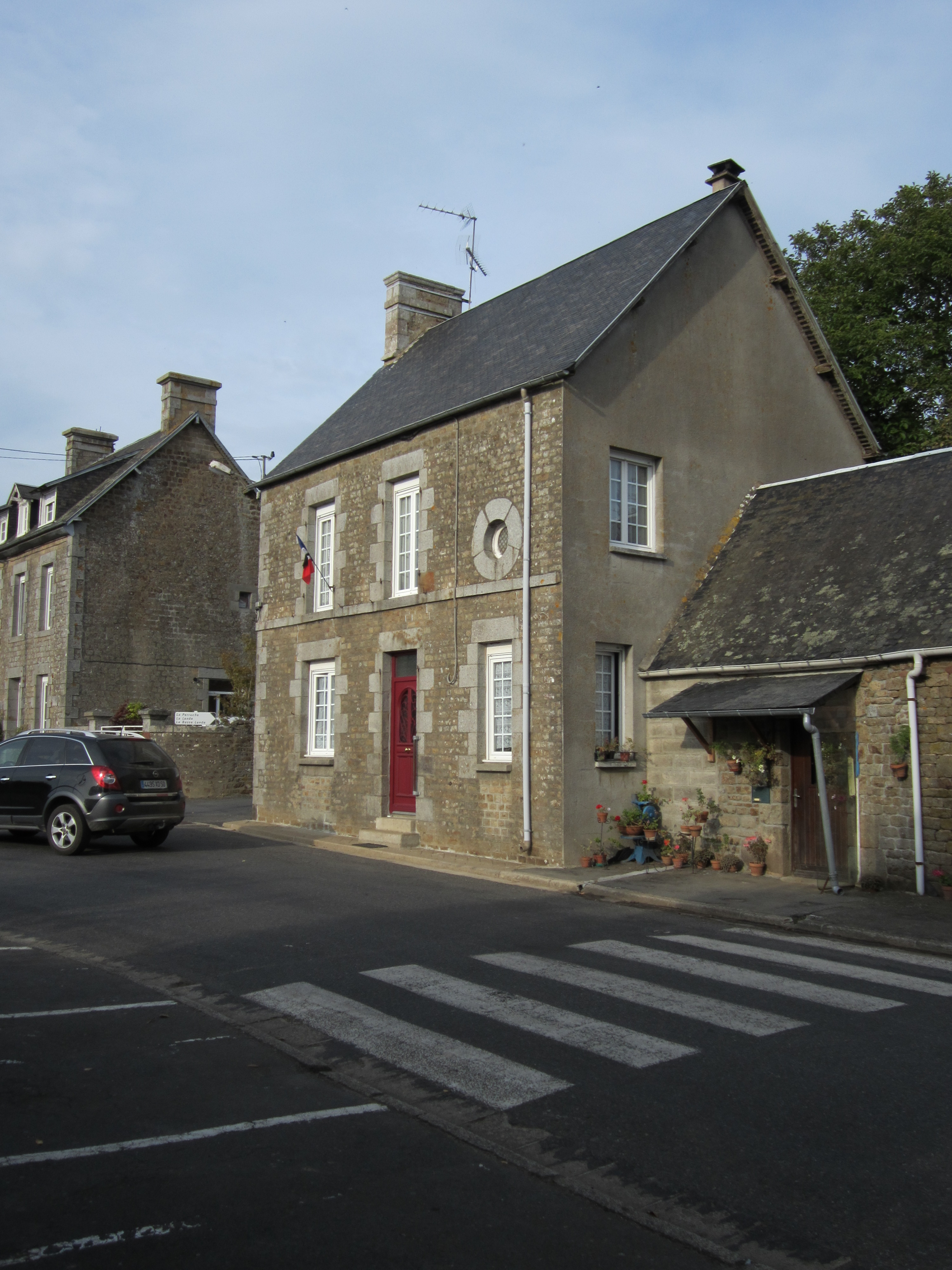 Heussé, Manche